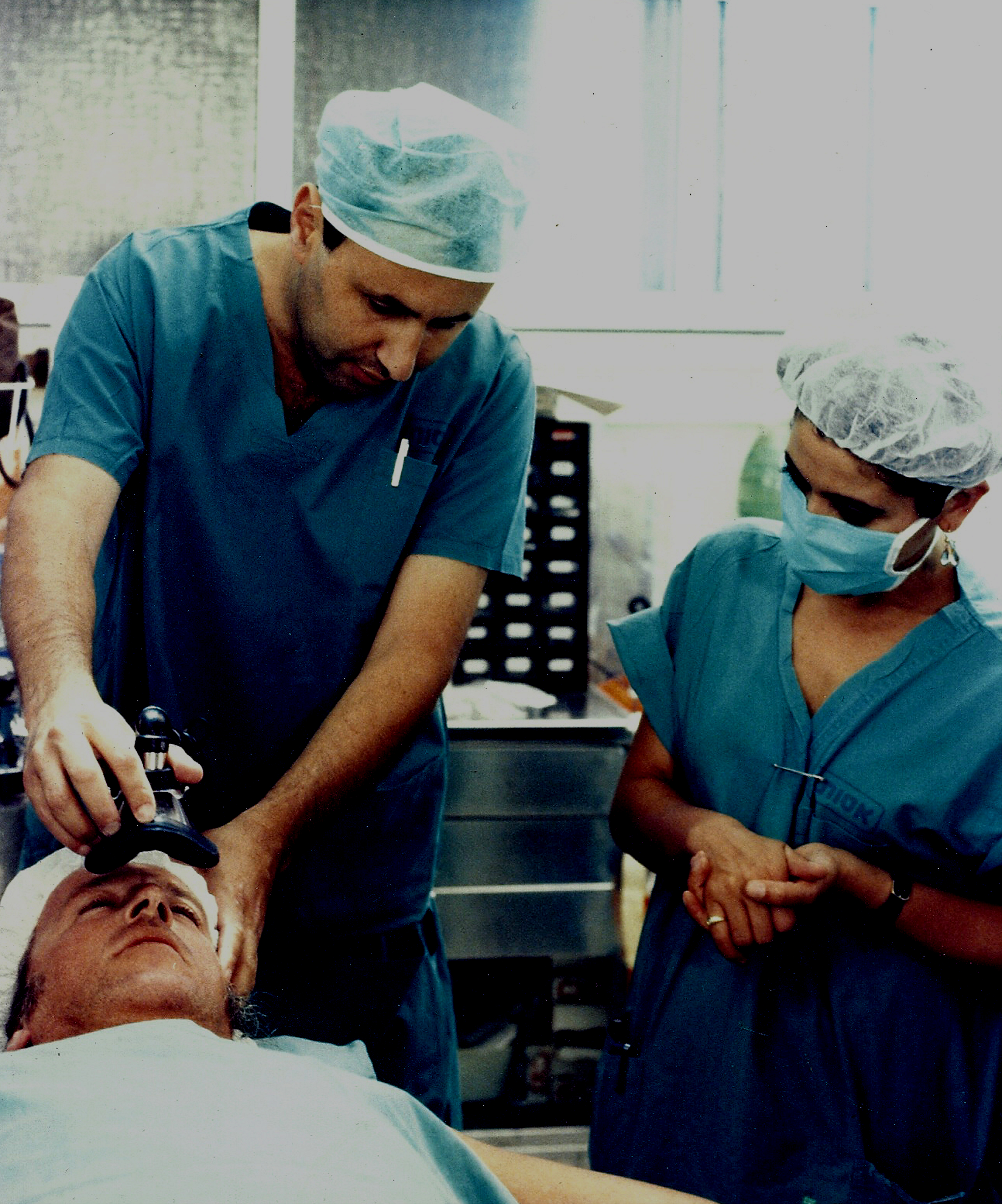 מיקי בהגן מביים את סצינת חדר הניתוח ב"מוות בטוח" עם נתן זהבי, מתוך "סיפורים לשעת לילה"